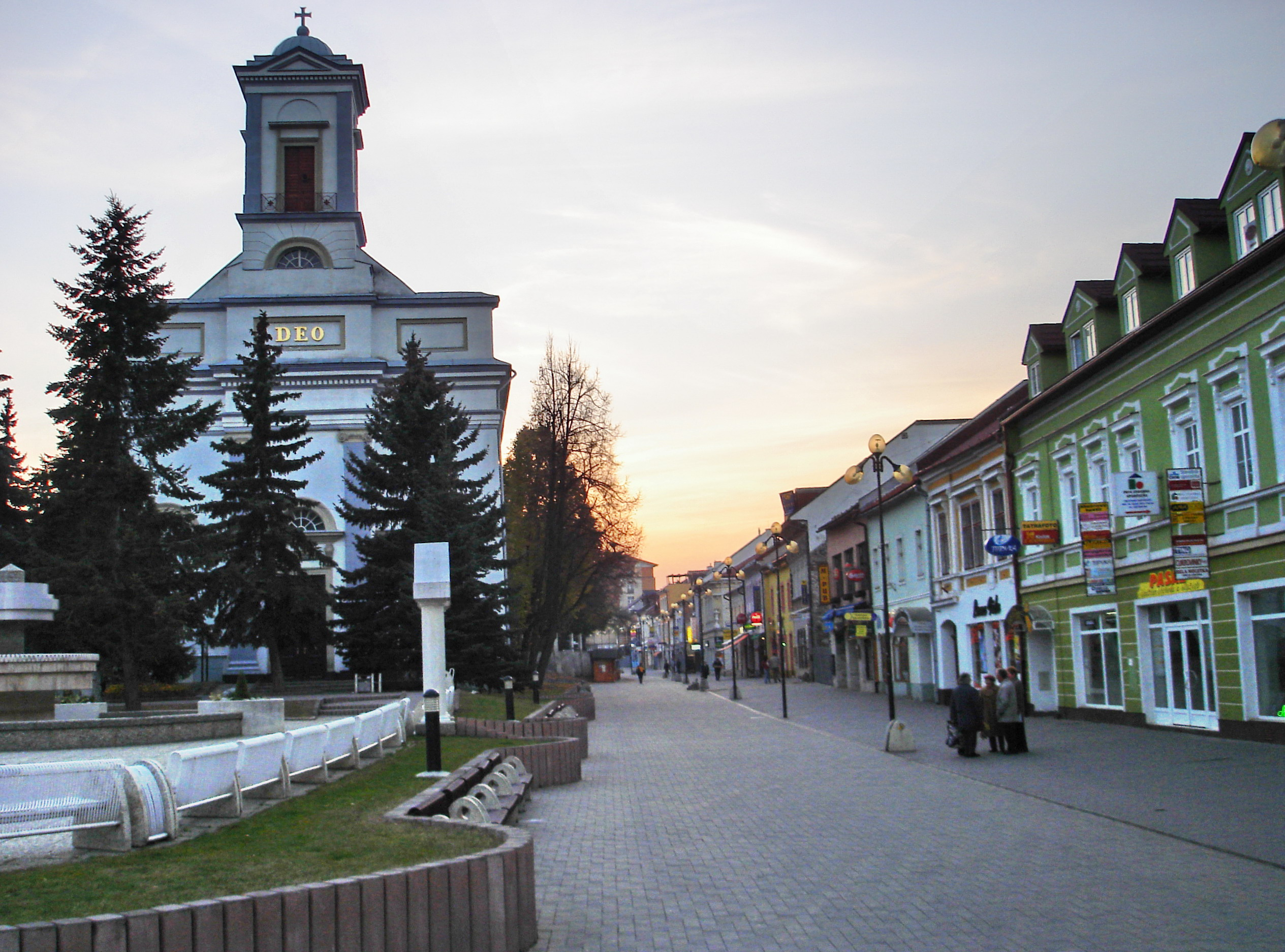 Poprad - Námestie sv. Egídia